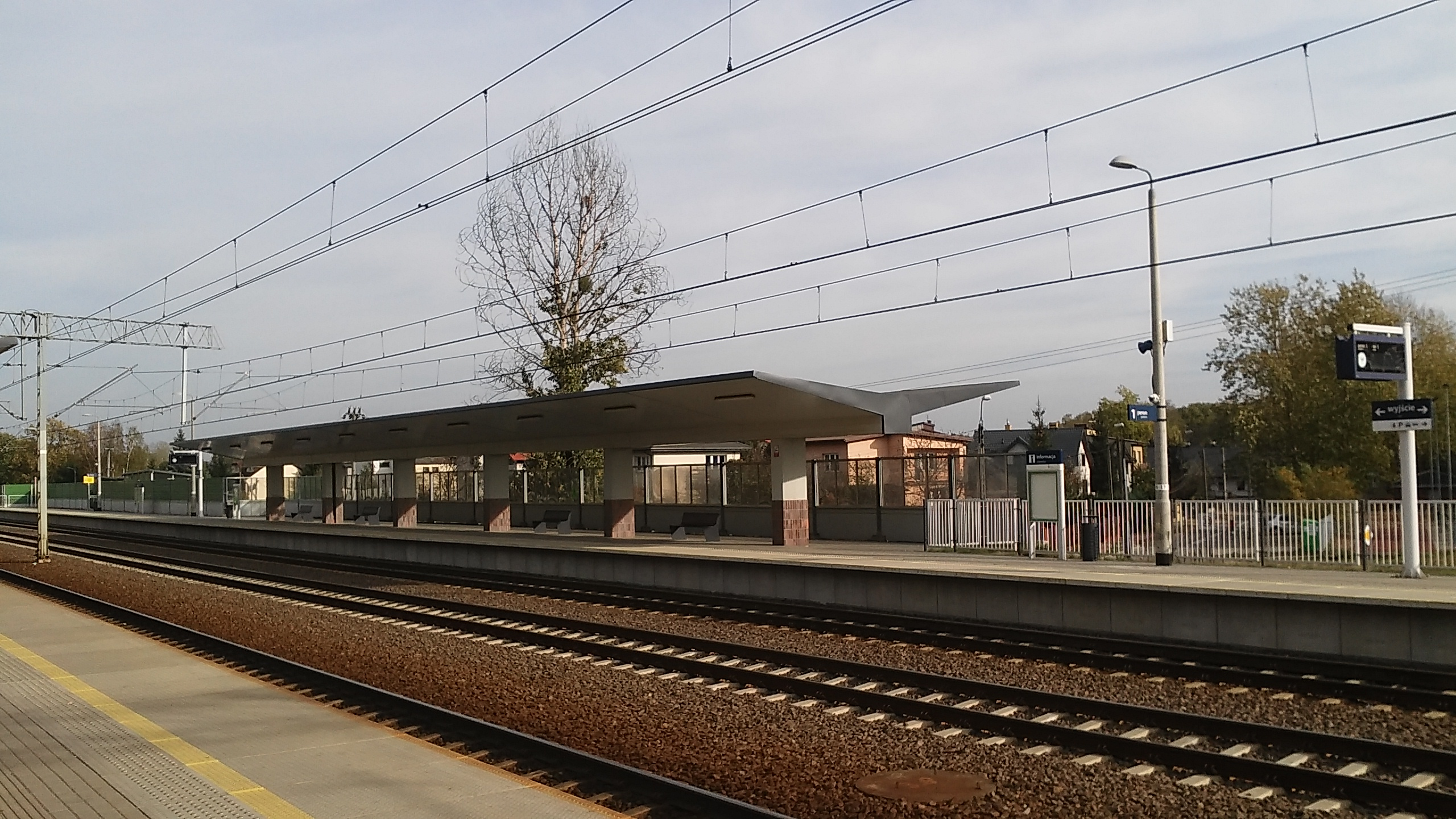 stacja kolejowa Zielonka - peron 1